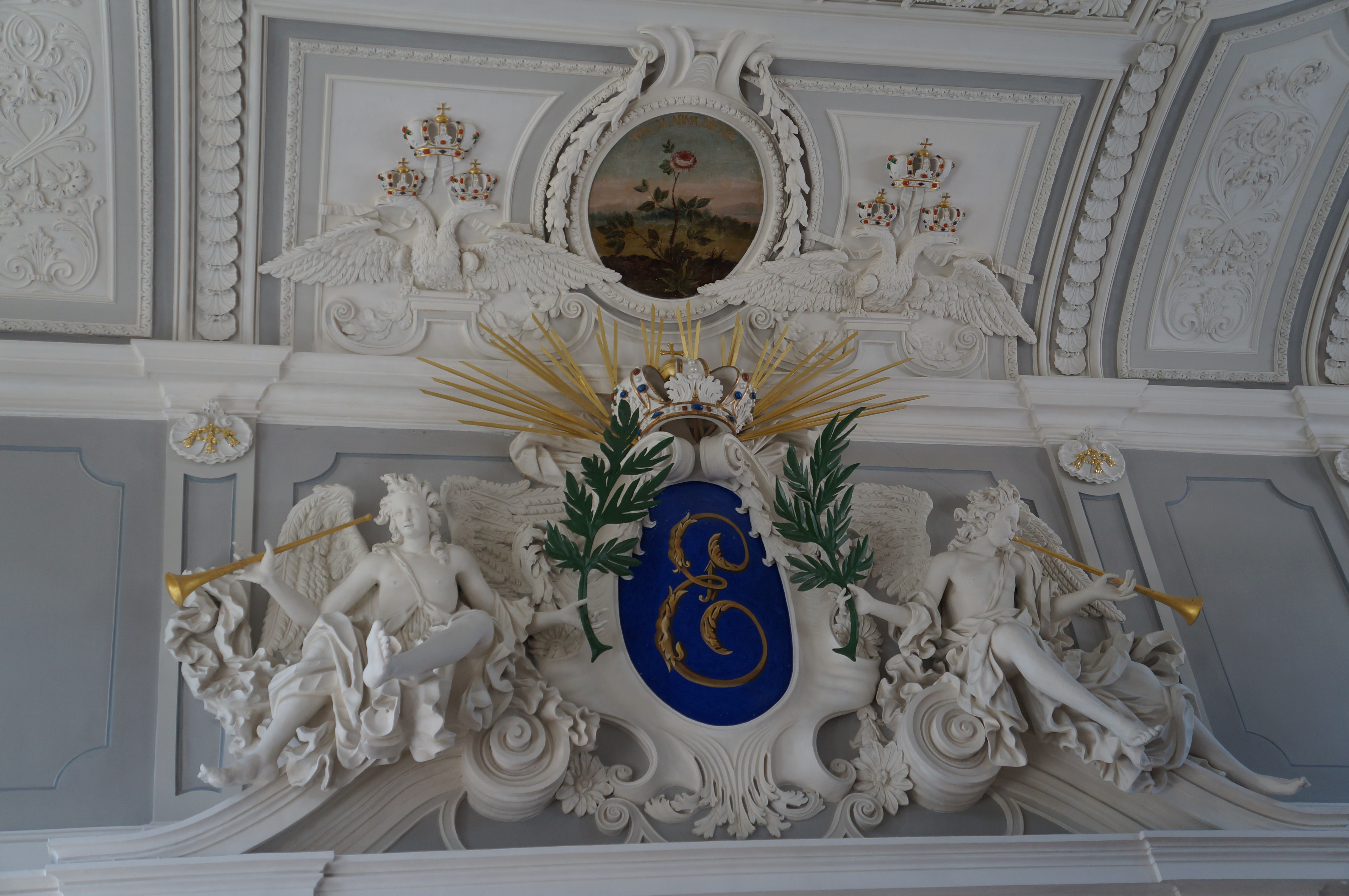 Kadriorg_Palace à Tallinn, Estonie. Décoration en stuc avec les initiales de Catherine dans la grande salle